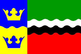 Vlag gemeente Graft-De Rijp